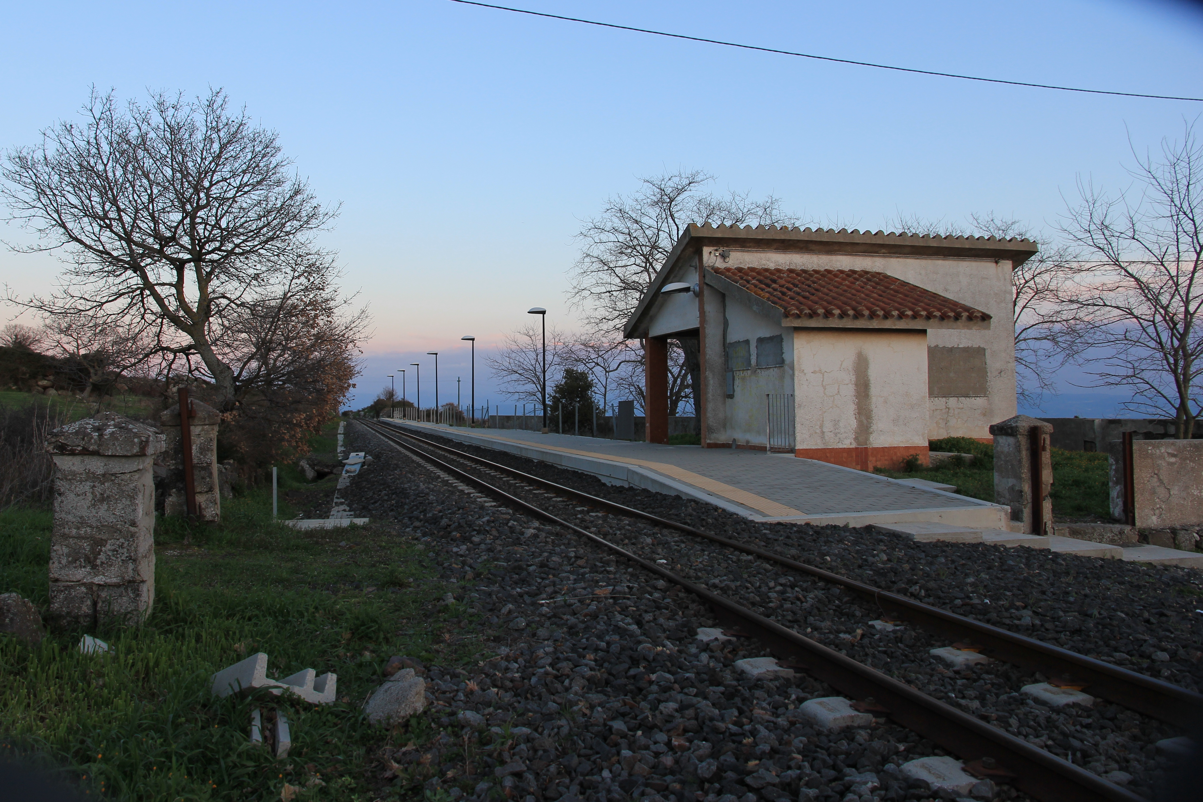 Stazione ferroviaria ARST di Birori